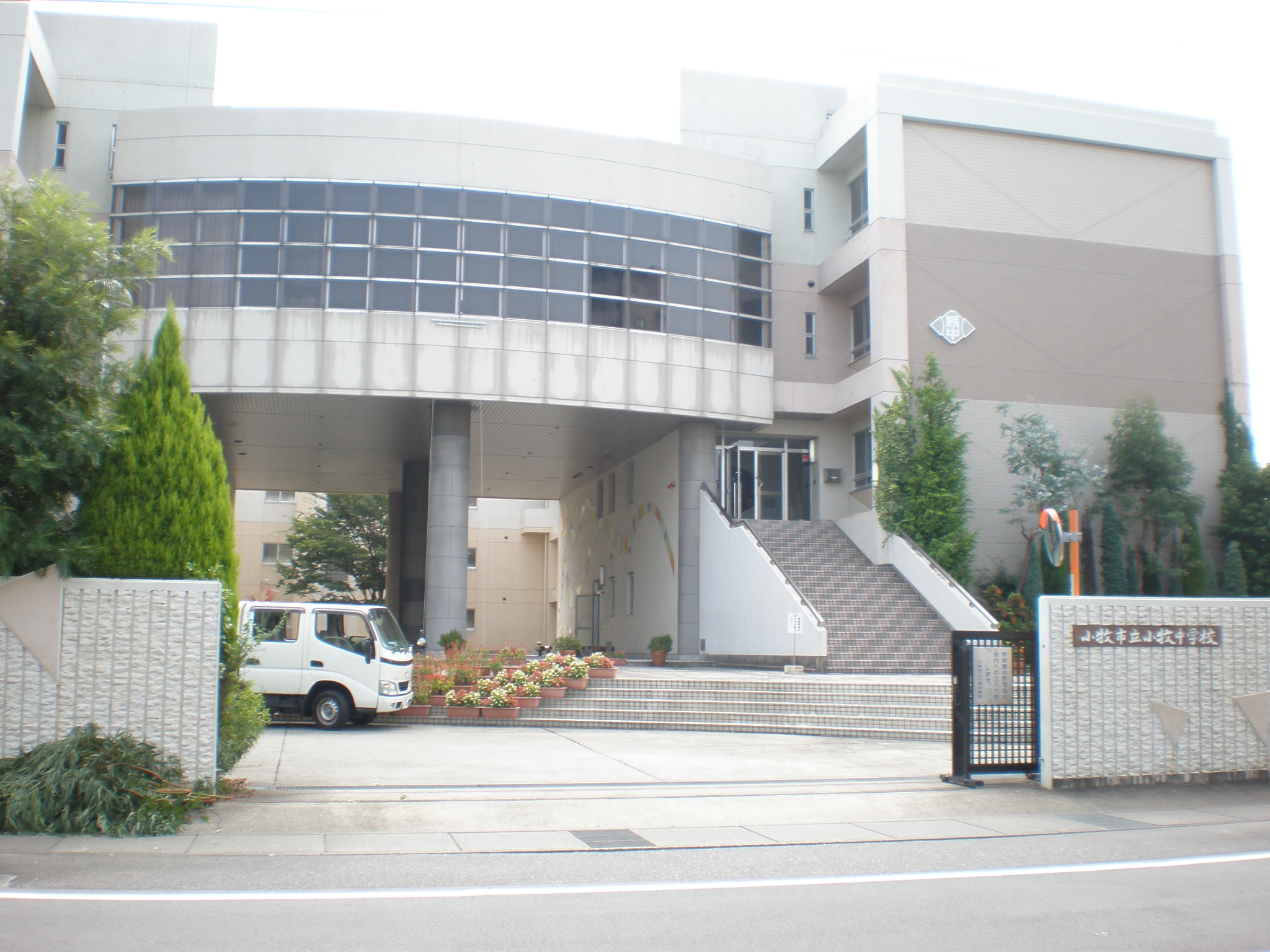 愛知県小牧市にある小牧市立小牧中学校